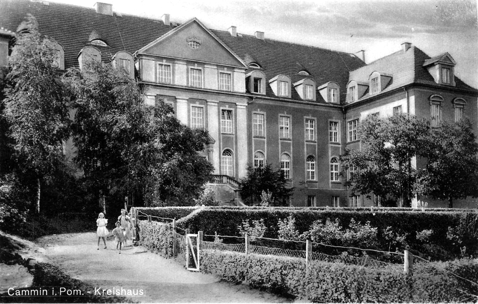 Kamień Pomorski dawnej